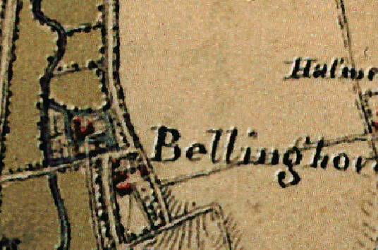 Haus Bellinghoven in Kerken-Nieukerk auf der Tranchotkarte